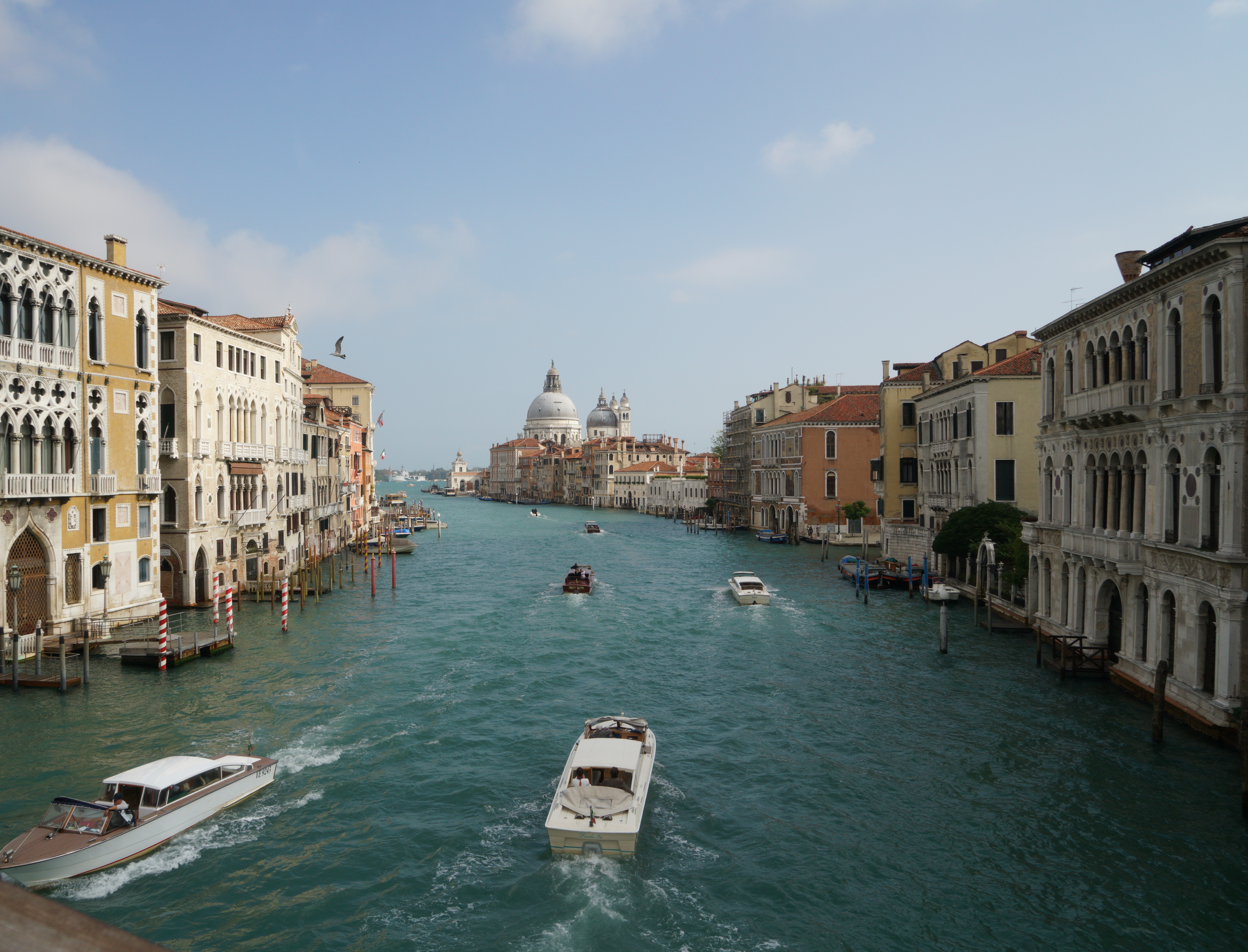 Canal Grande di Venezia fotografato dal Ponte dell'Accademia